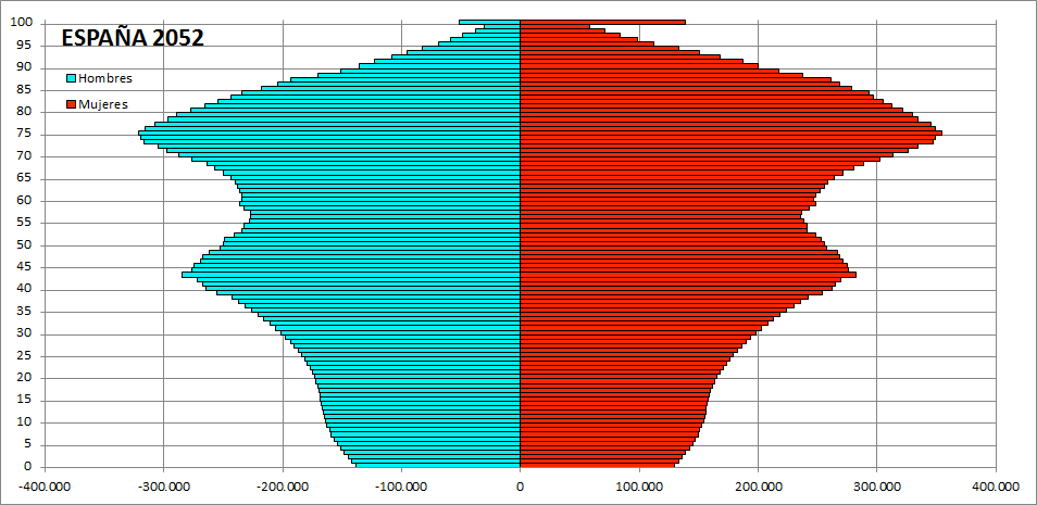 Proyecciones demográficas INE, Proyecciones a largo plazo, año 2052